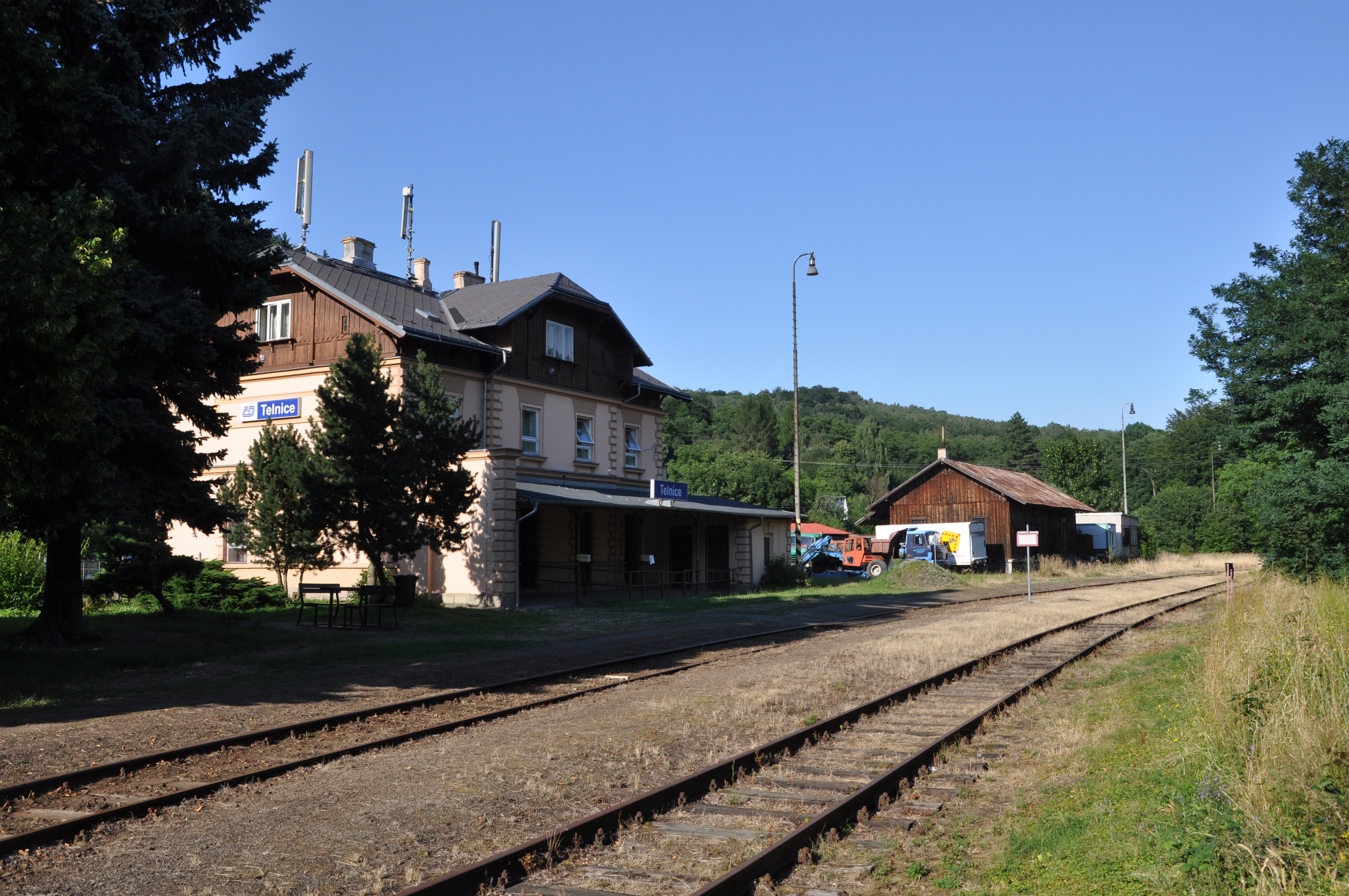 Bahnhof Telnice, Bahnstrecke Děčín–Chomutov